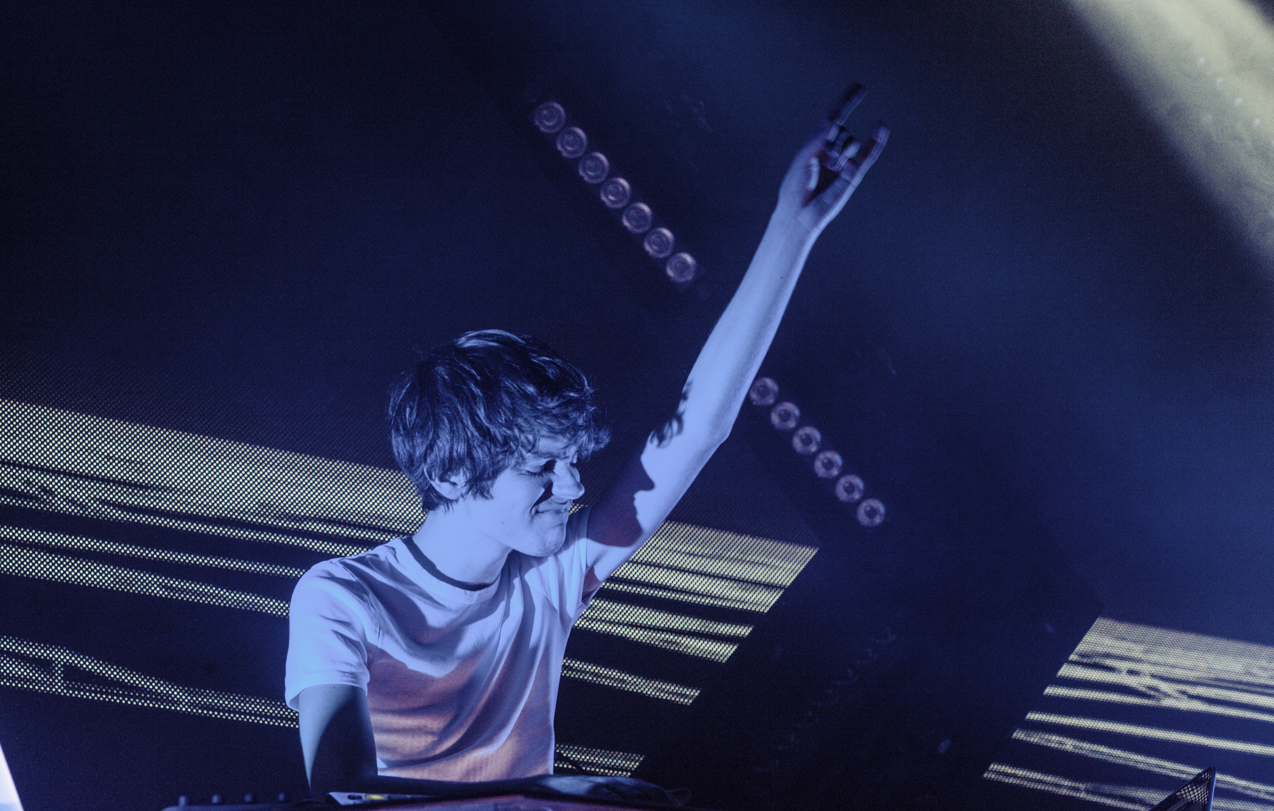 Madeon, Brussels Live, 04 april 2015